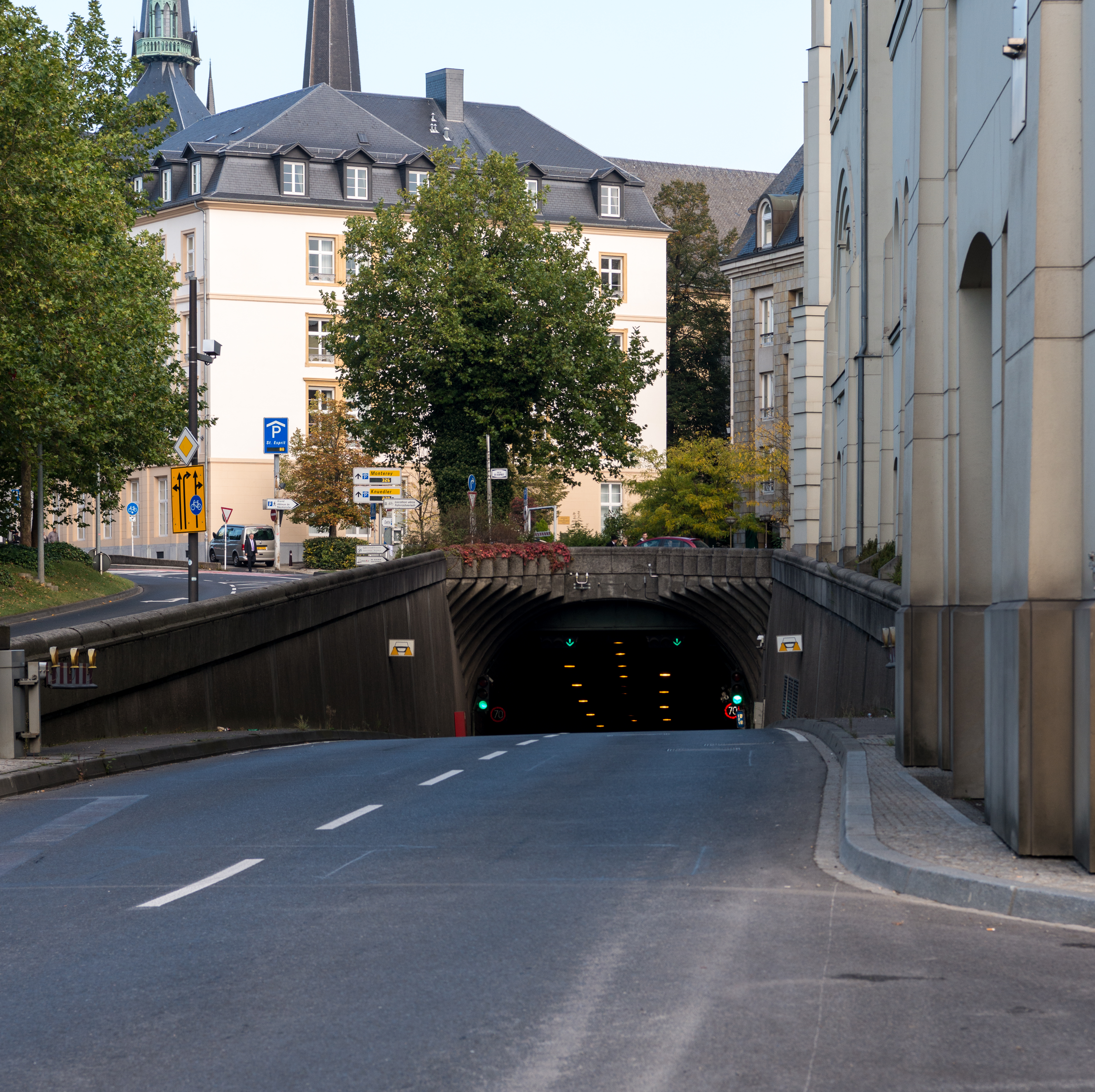 D'Entrée vum Helleg-Geescht-Tunnel.